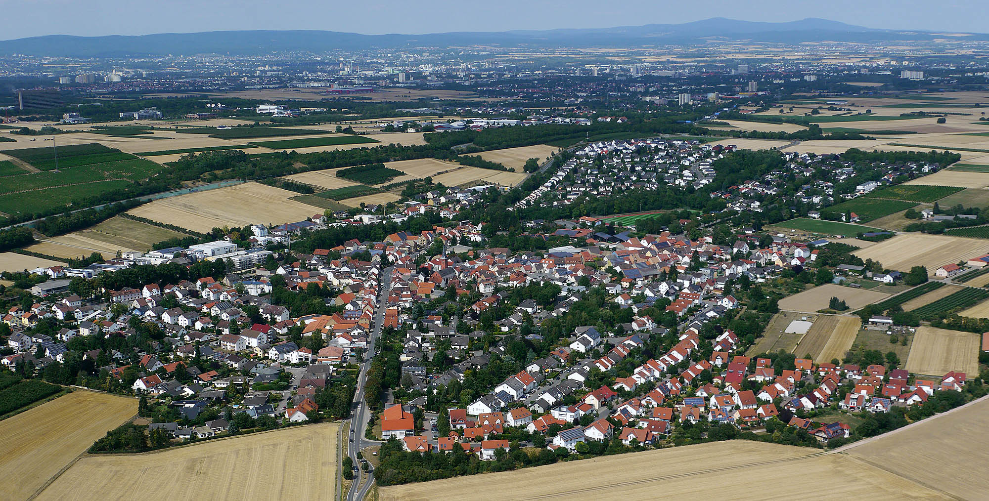 Luftaufnahme des rheinhessischen Ortes Klein-Winterheim (2015)